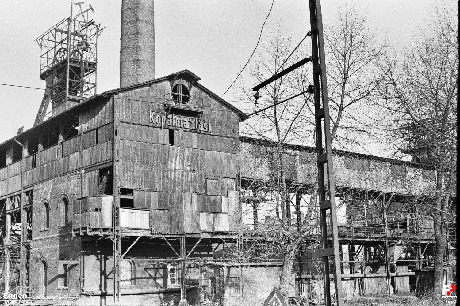 Świętochłowice dzielnica Chropaczów nieistniejąca kopalnia Śląsk szyb IV .